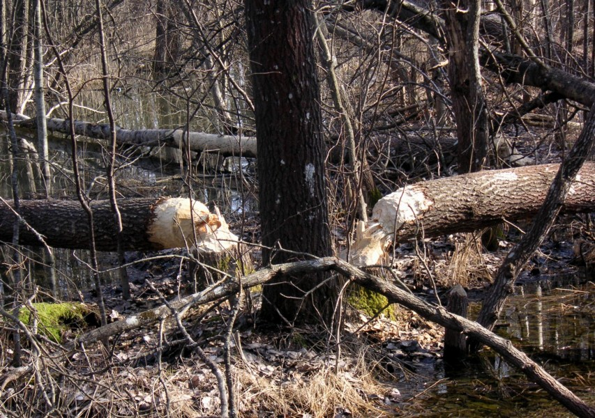 Flatensjö, bävrar vid Listudden